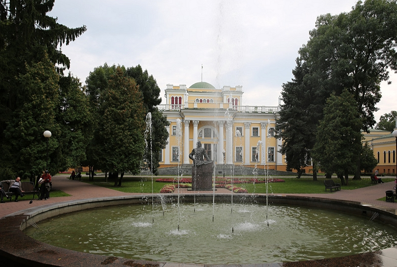 Палацава-паркавы комплекс у Гомелі